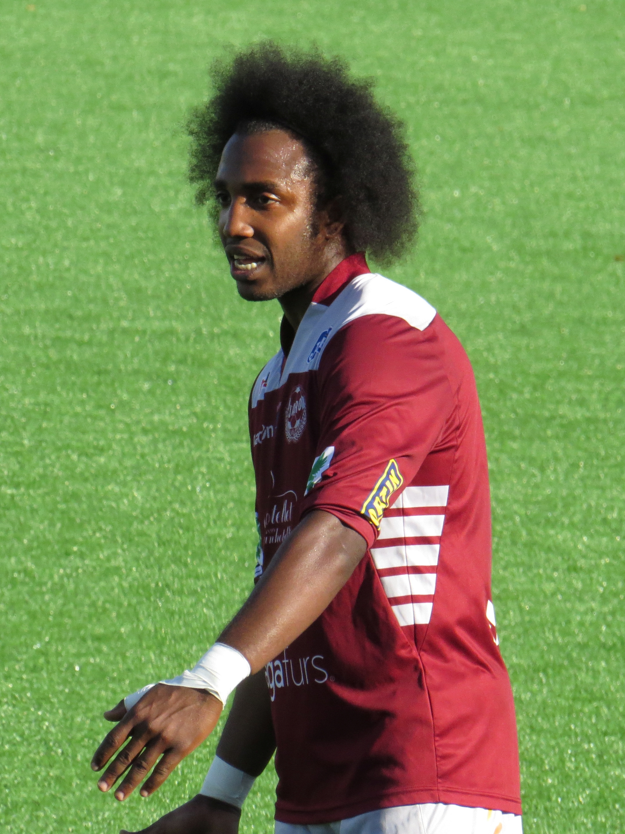 Walter Moore, guyanalainen jalkapalloilija FF Jaron joukkueessa kaudella 2015.